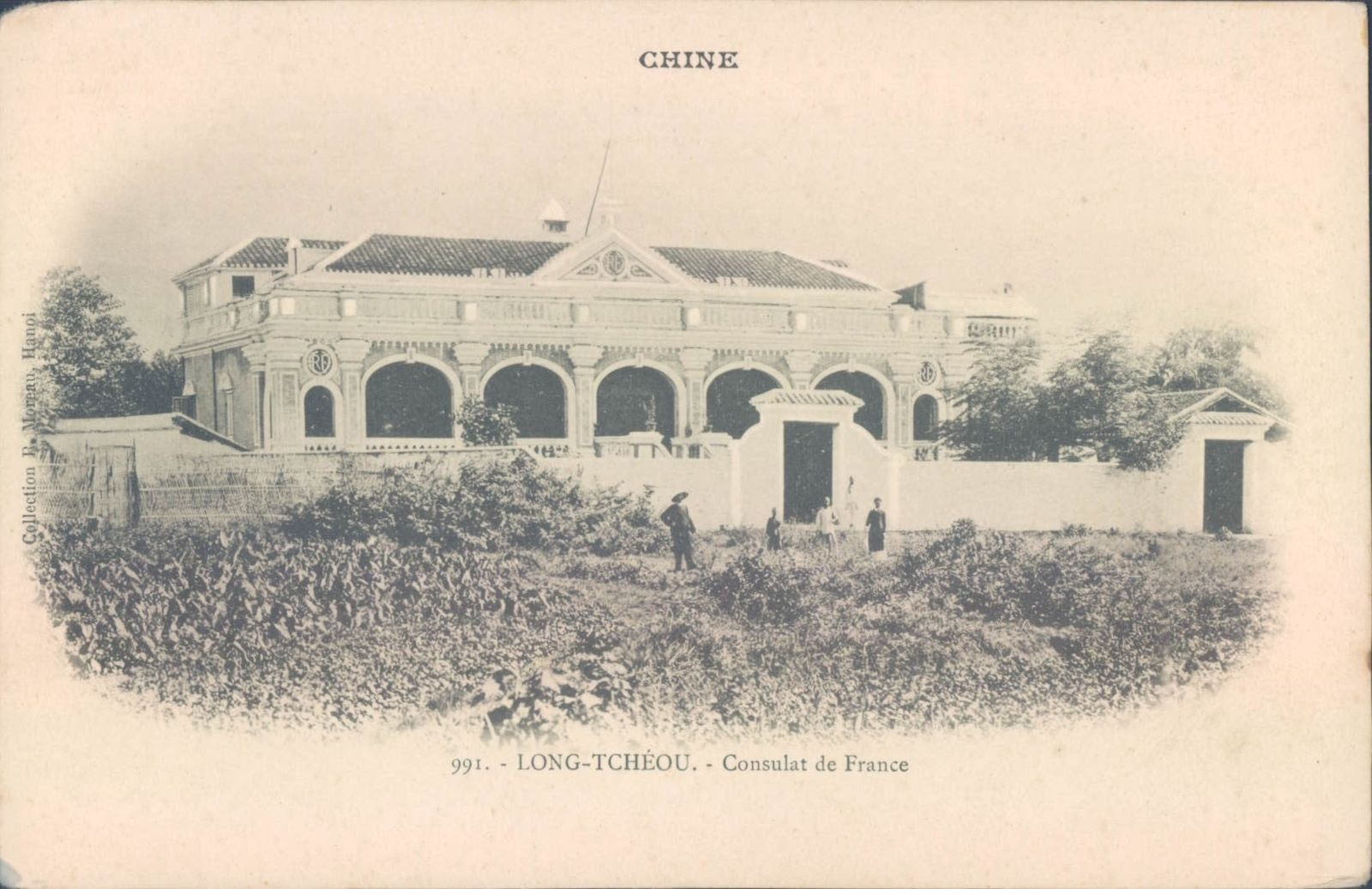 法国驻龙州领事馆